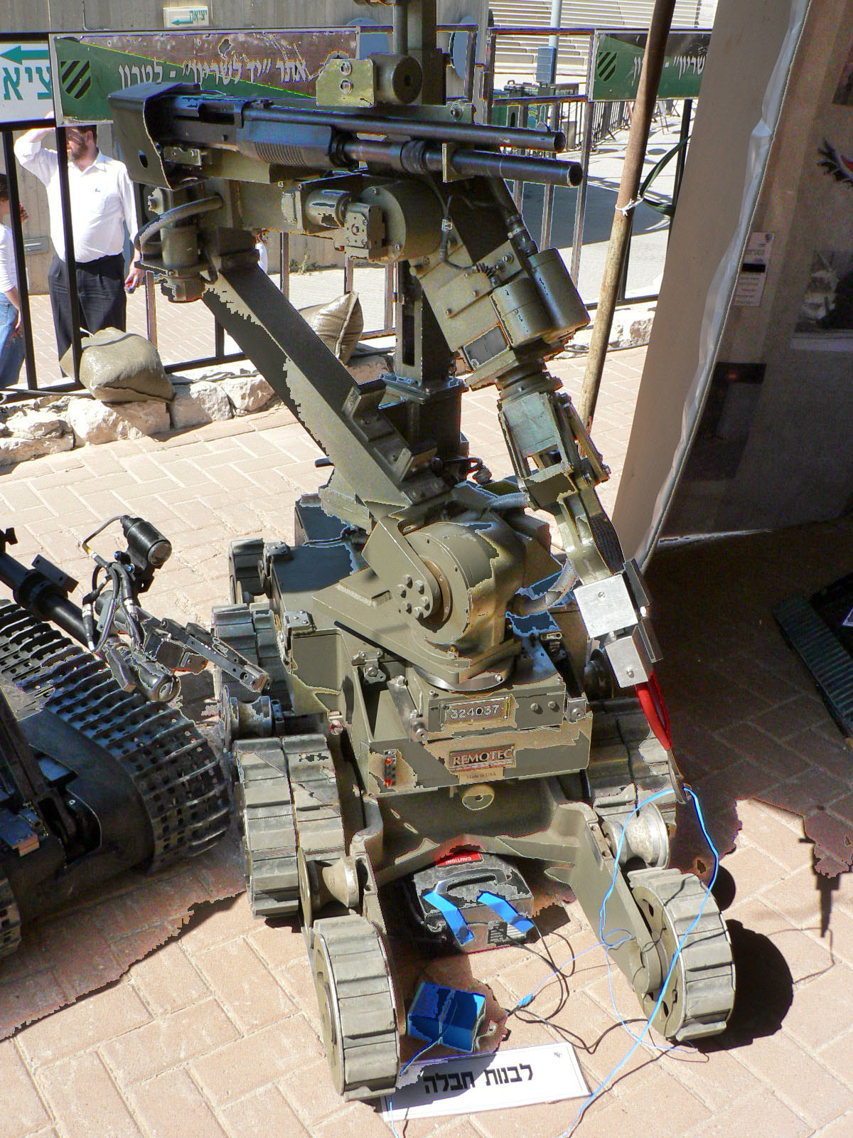 IDF Engineering Corps Remotec ANDROS bomb disposal robot רובוט סילוק פצצות של חיל ההנדסה הישראלי מדגם רמוטק אנדרוס